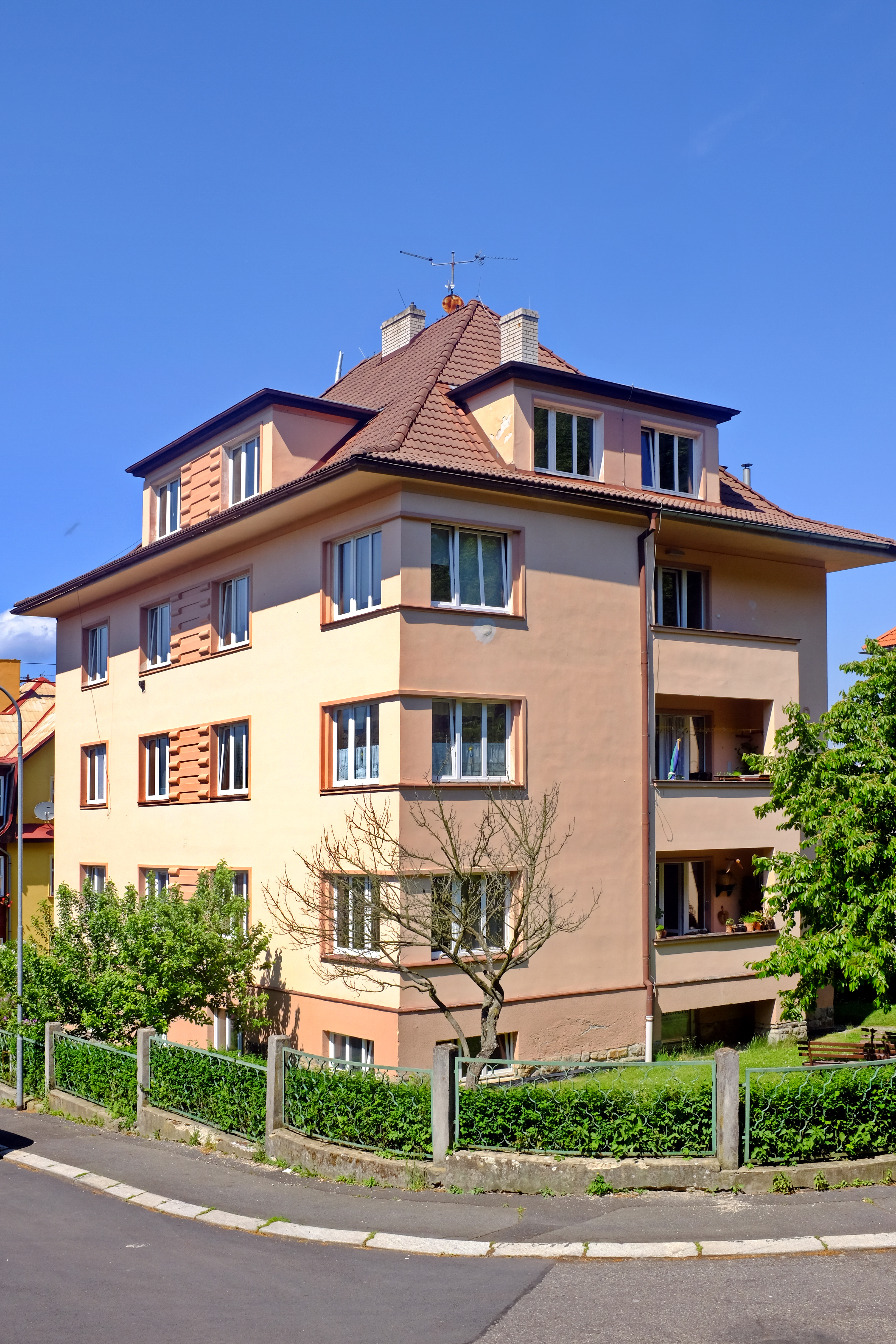 Karlovy Vary, místní čtvrť (ZSJ) Tuhnice, Vrázova 26